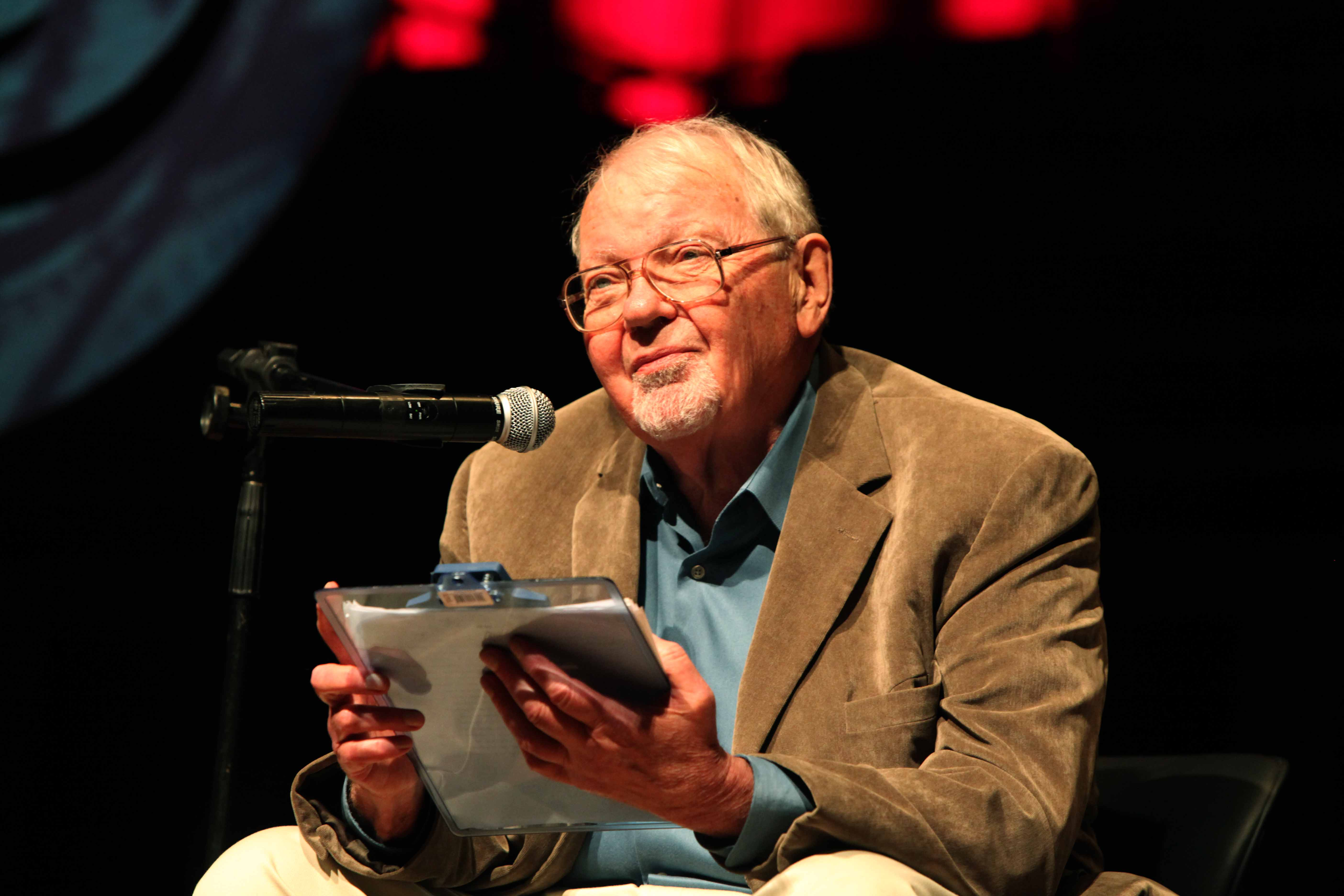 Fredric Jameson no Fronteiras São Paulo